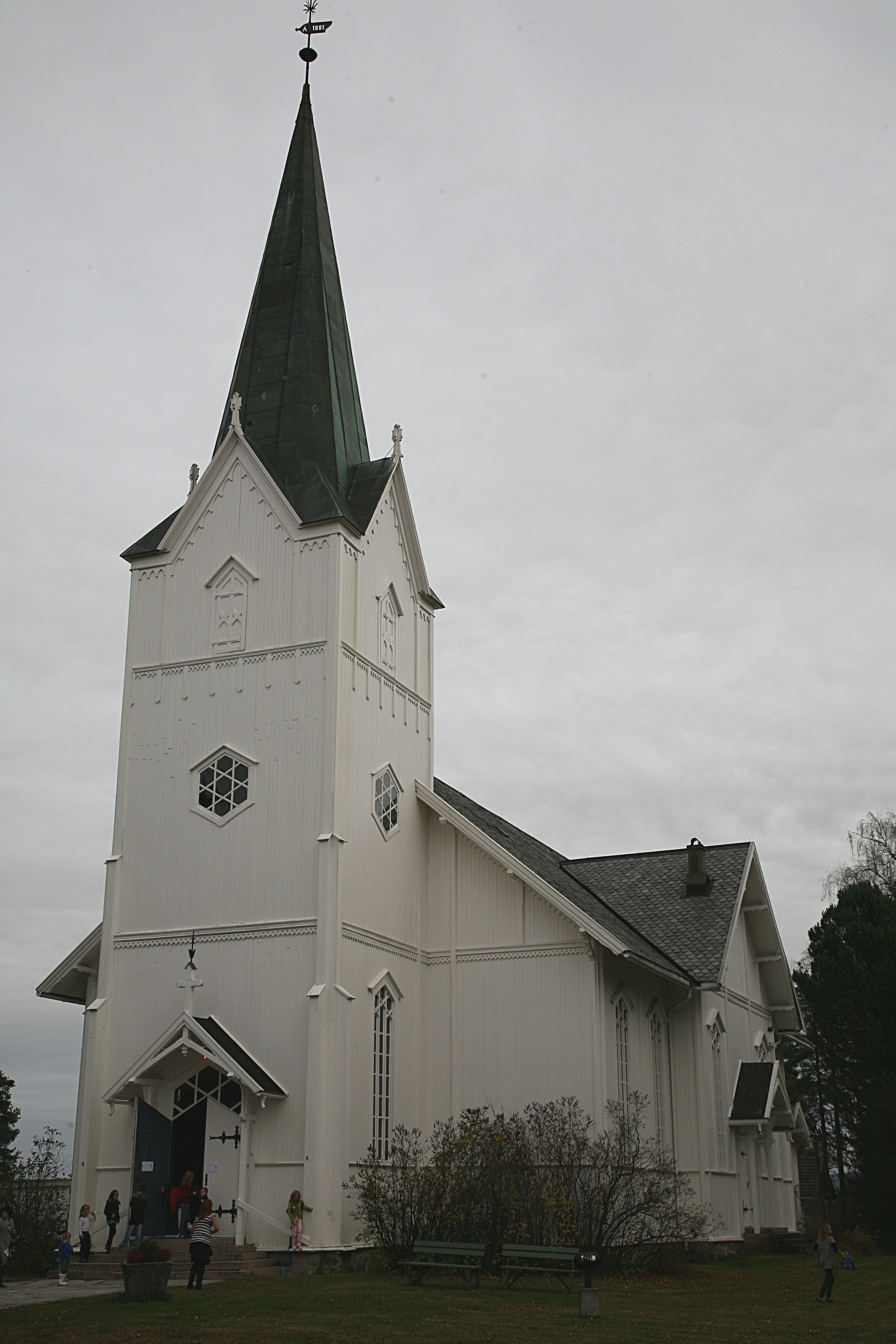 Aurskog kirke. Church in Aurskog-Høland, Akershus, Norway.